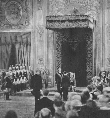 Designacija Aimone Tomislava II. 18.05.1941. ispred kralja je poglavnik Pavelić, dok lijevo vojskovođa Kvaternik